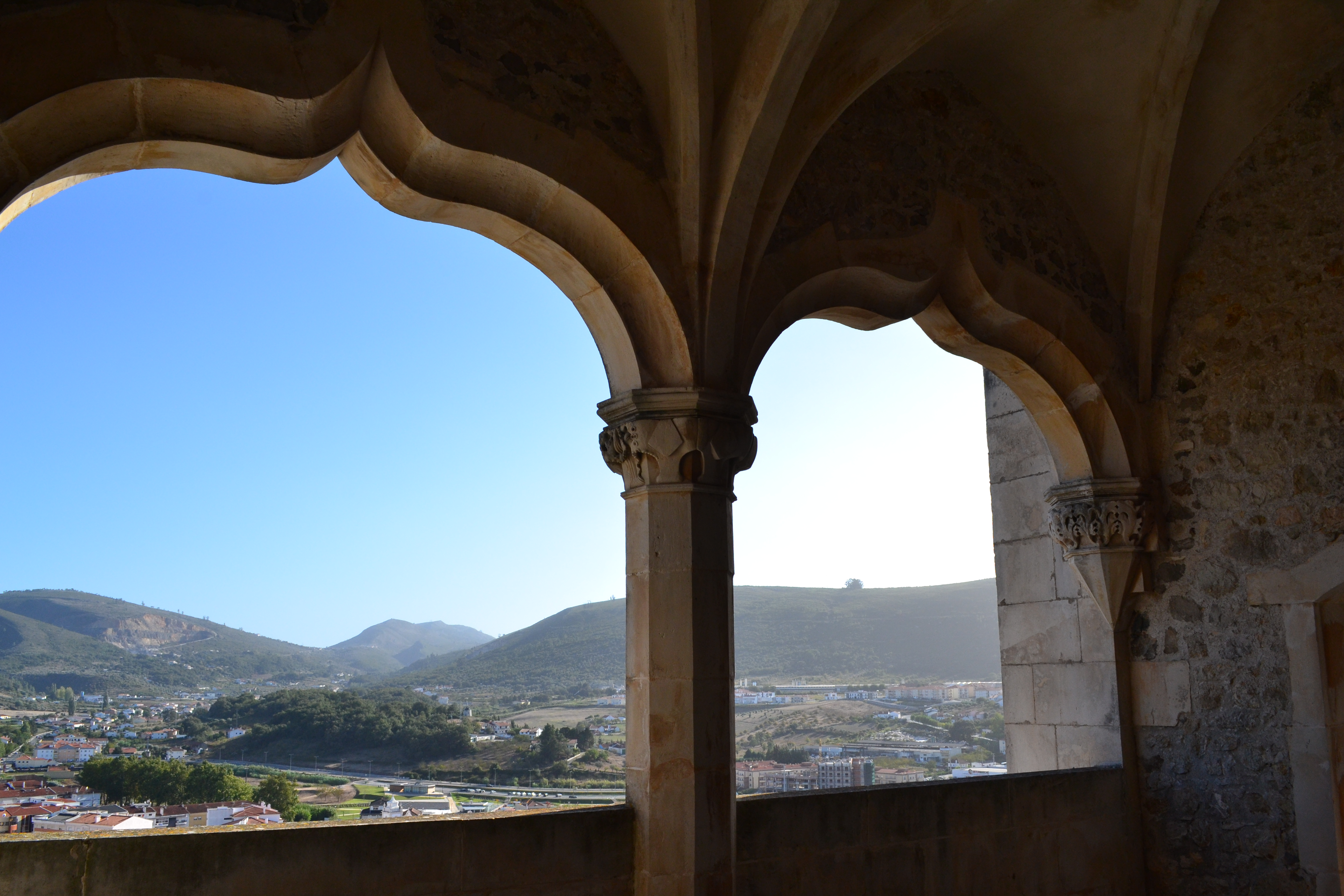 Castelo de Porto de Mós, vista da loggia sobre Porto de Mós This file was uploaded for Wiki Loves Monuments in Portugal with the unique identifier 69870.